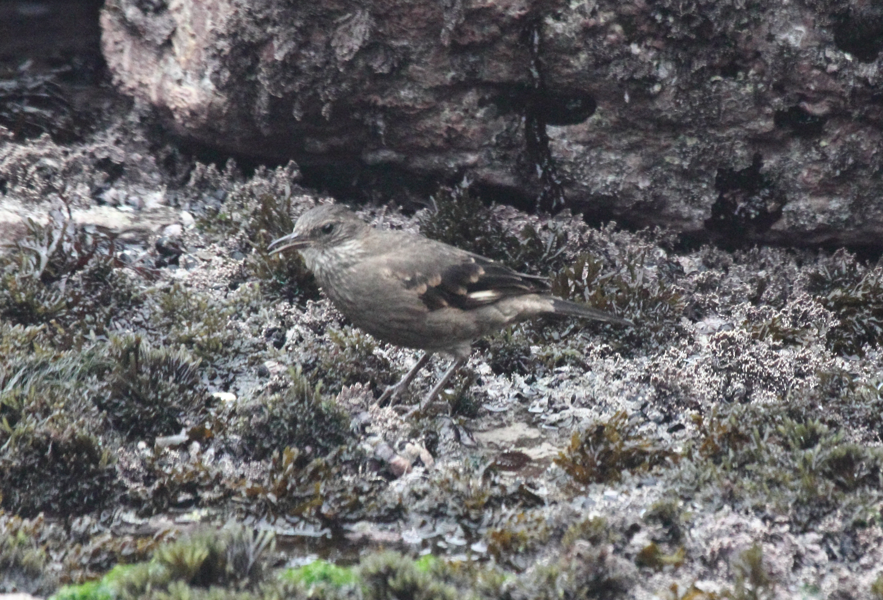 Surf Cinclodes (Cinclodes taczanowskii)